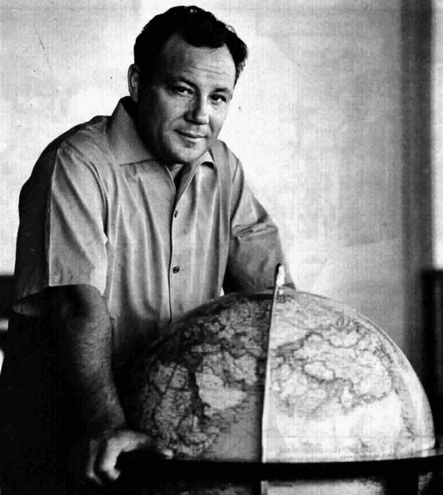 Italian singer Claudio Villa